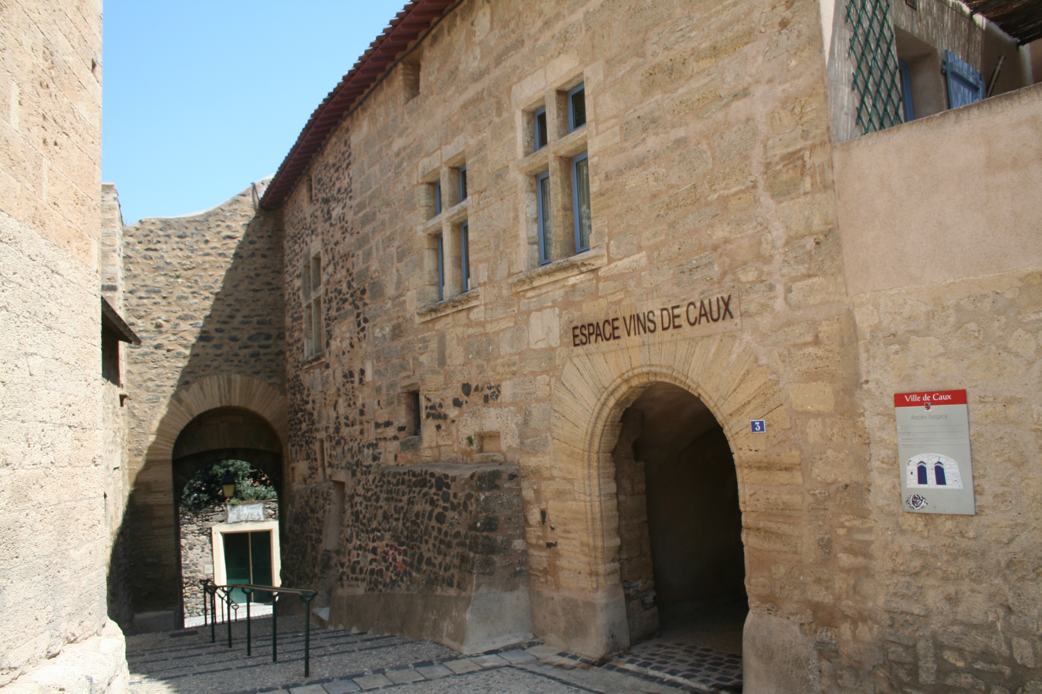 Caux (Hérault) - Hospice et Porte du village (muraille intérieure).